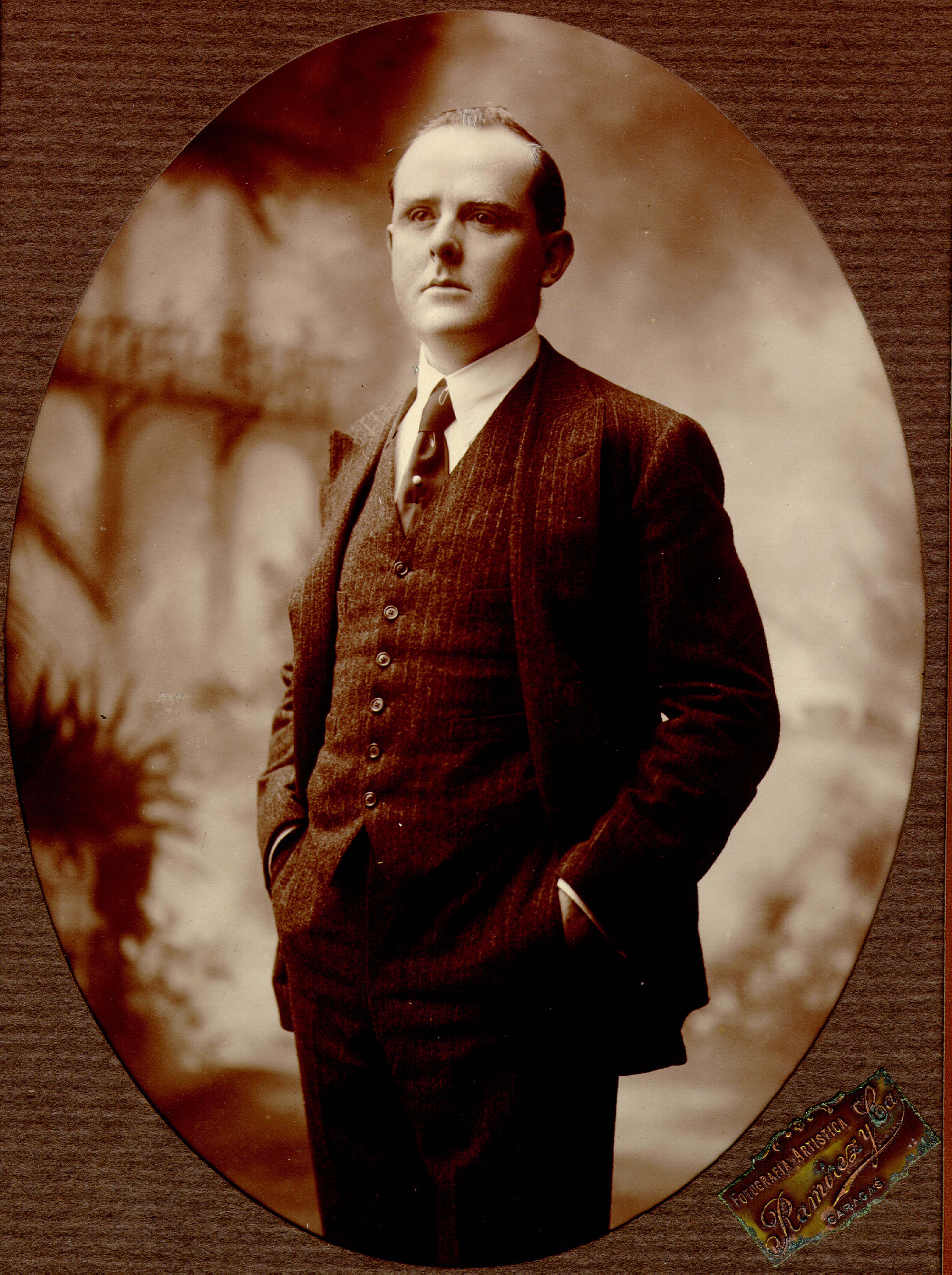 Retrato de Alberto F. Vollmer Boulton